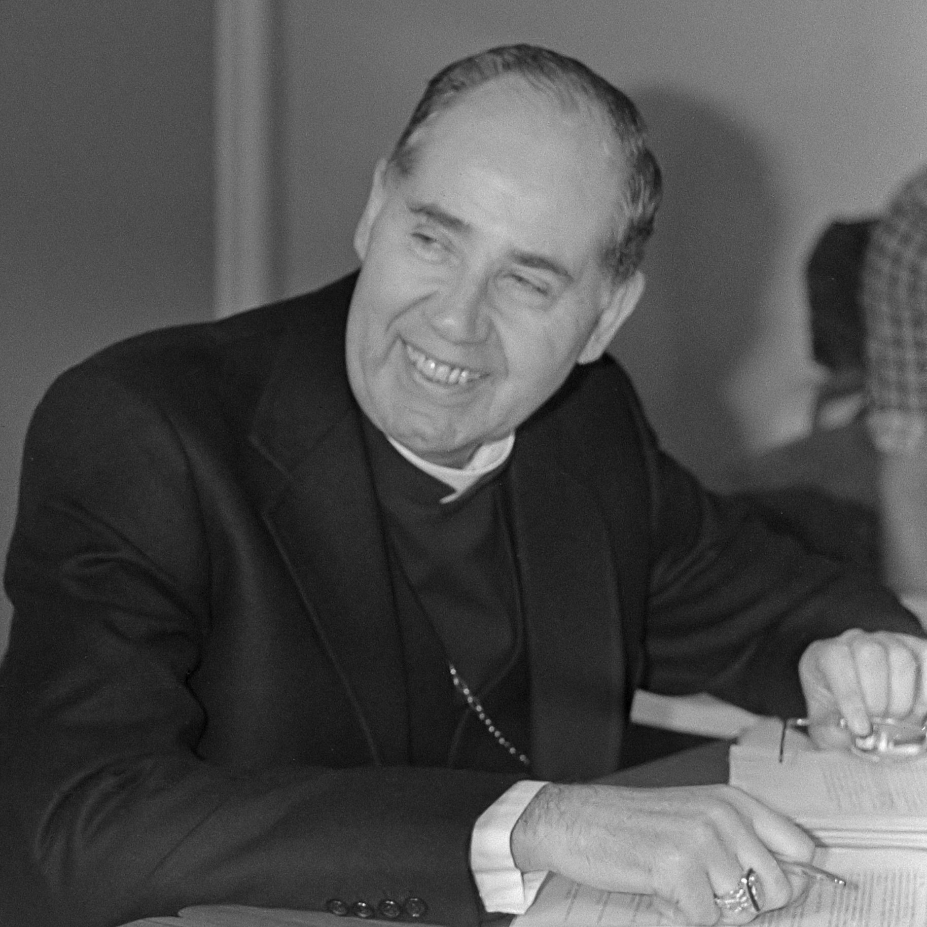 Bisschoppenconferentie in Amersfoort; Gijsen (l) en hulpbisschop Castermans (r) 14 februari 1984